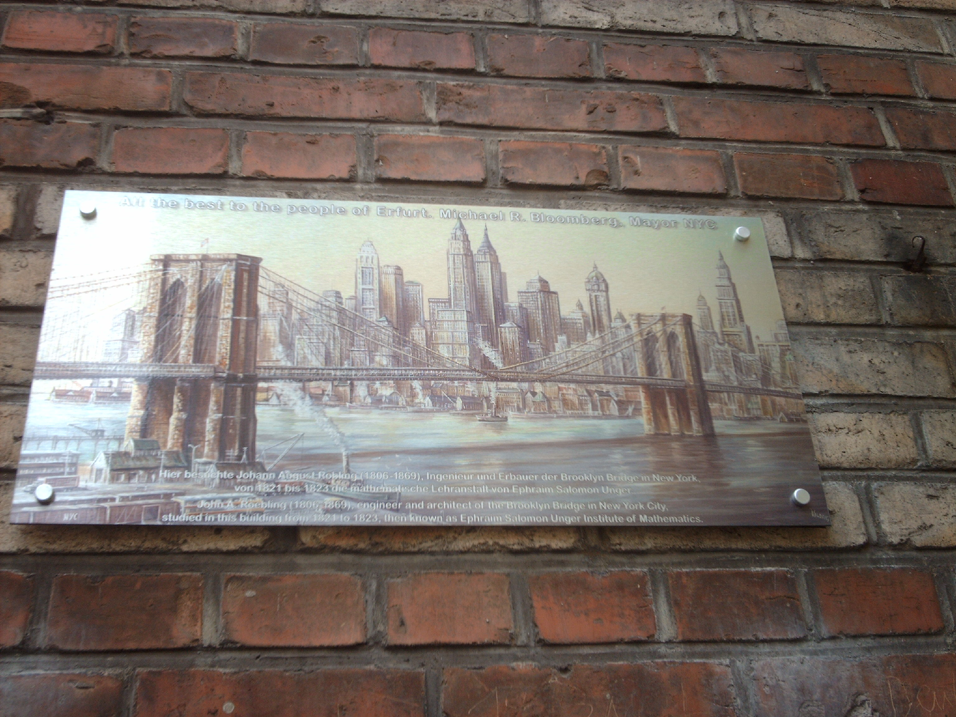 Gedenktafel für den Erbauer der Brooklyn-Bridge John A. Roebling an seiner Schule in Erfurt, Marktstraße 6